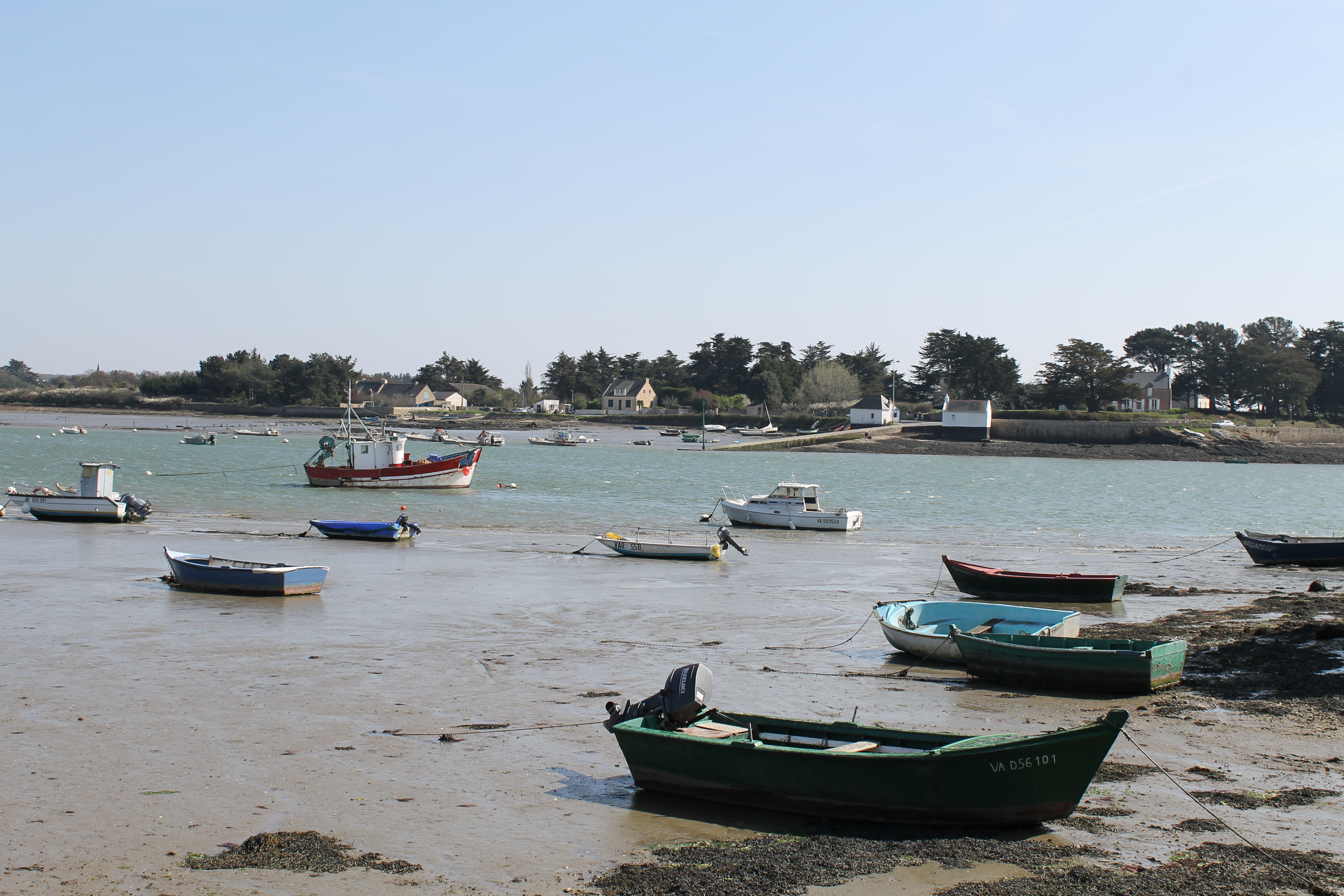 Passage Saint-Armel, entre Séné et Saint-Armel, à travers la rivière de Noyalo. Vu de Séné.